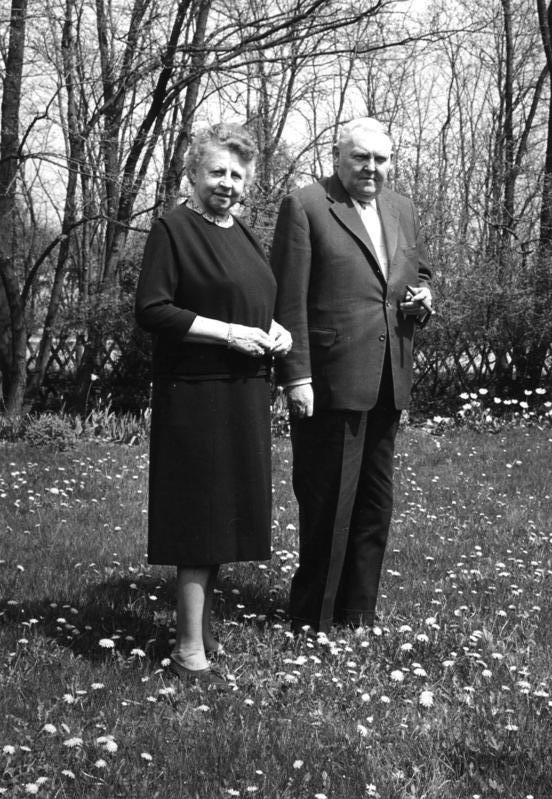 6.5.1963 Prof. Dr. Ludwig Erhard, Minister für Wirtschaft der Bundesrepublik Deutschland, mit Gattin